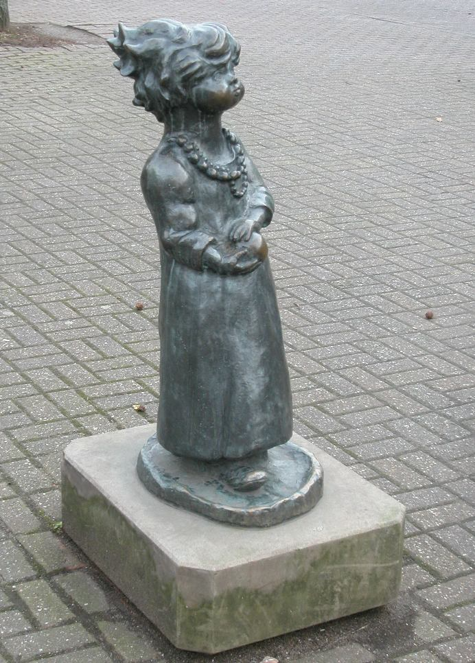 Mädchen mit Ball, von Otto Pankok, Mülheim/Saarn, Düsseldorfer Straße Standort: 51°24′12.65″N 6°52′41.76″E / 51.4035139°N 6.8782667°E